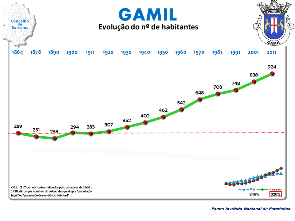 Censos 1964/2011